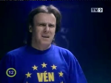 A 2007-es szilveszteri Irigy Hónaljmirigy műsorból, A Társulat című műsor paródiájában szereplő Varga Miklóst Molnár Imre alakítja. A jelenet szerint Varga Miklósnak Pelsőczy László színművész hangjára kellene playbackelnie.